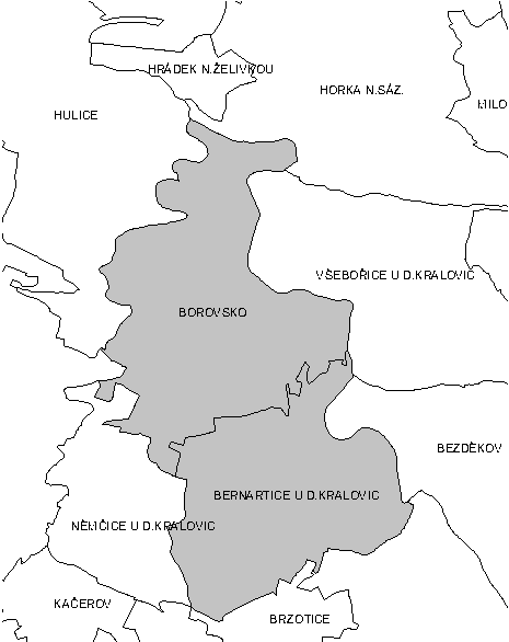 Katastrální členění Bernartic